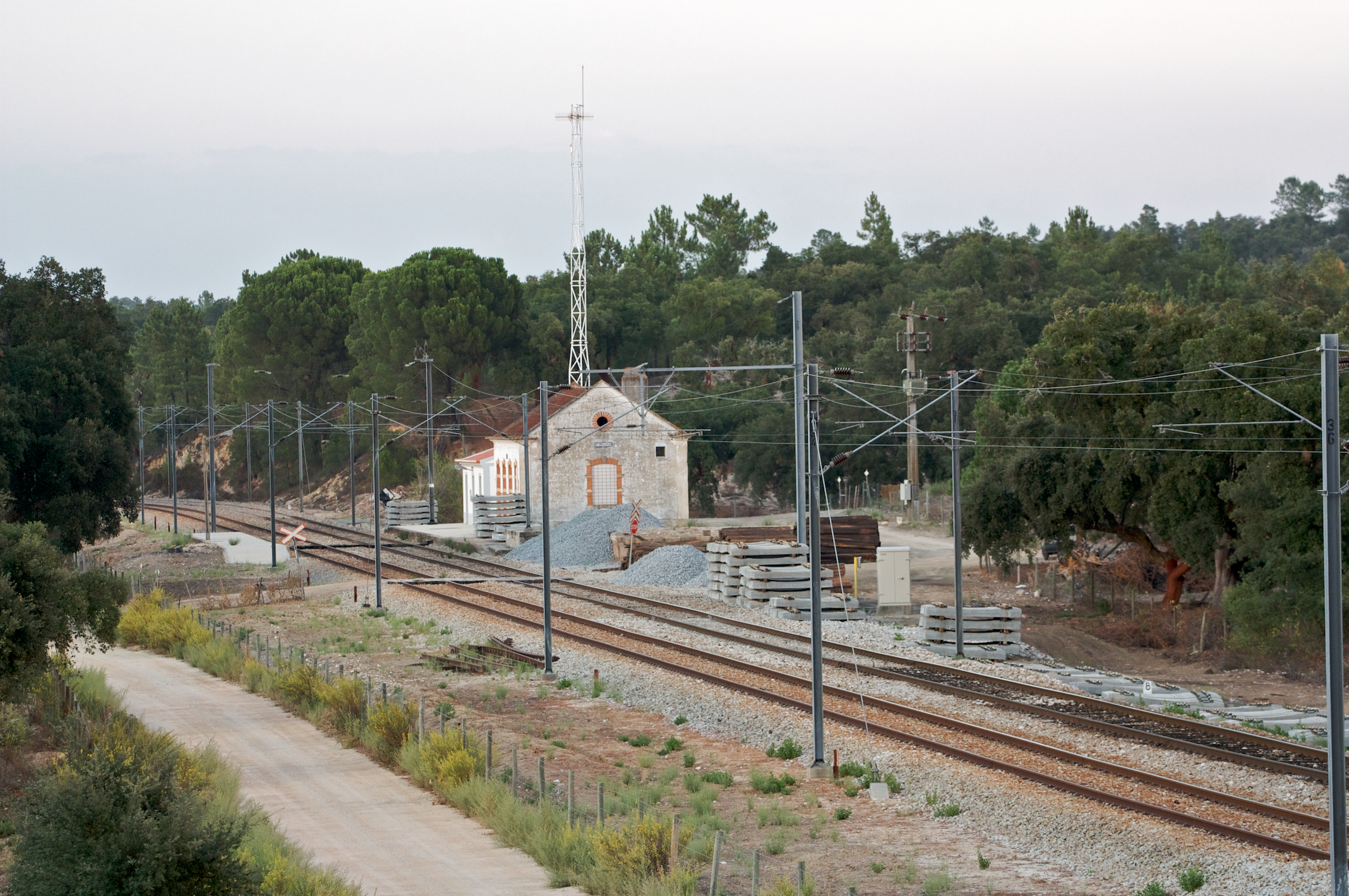 Tipo: ES [Estação Satélite] Local: Canha [Linha de Vendas Novas, PK 57] Data e hora: 25 de Setembro de 2009 [19h17]